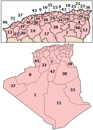 تمت اضافة ولاية "ميلا" (الولاية الثالثة و الاربعون) حيث كانت غير موجودة